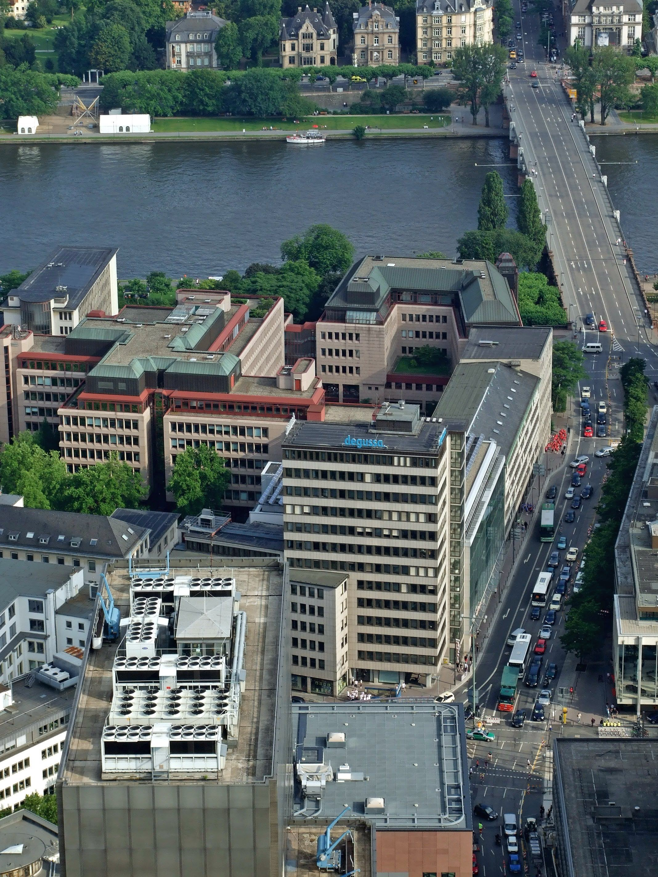 Ehemalige Degussa-Zentrale in Frankfurt am Main